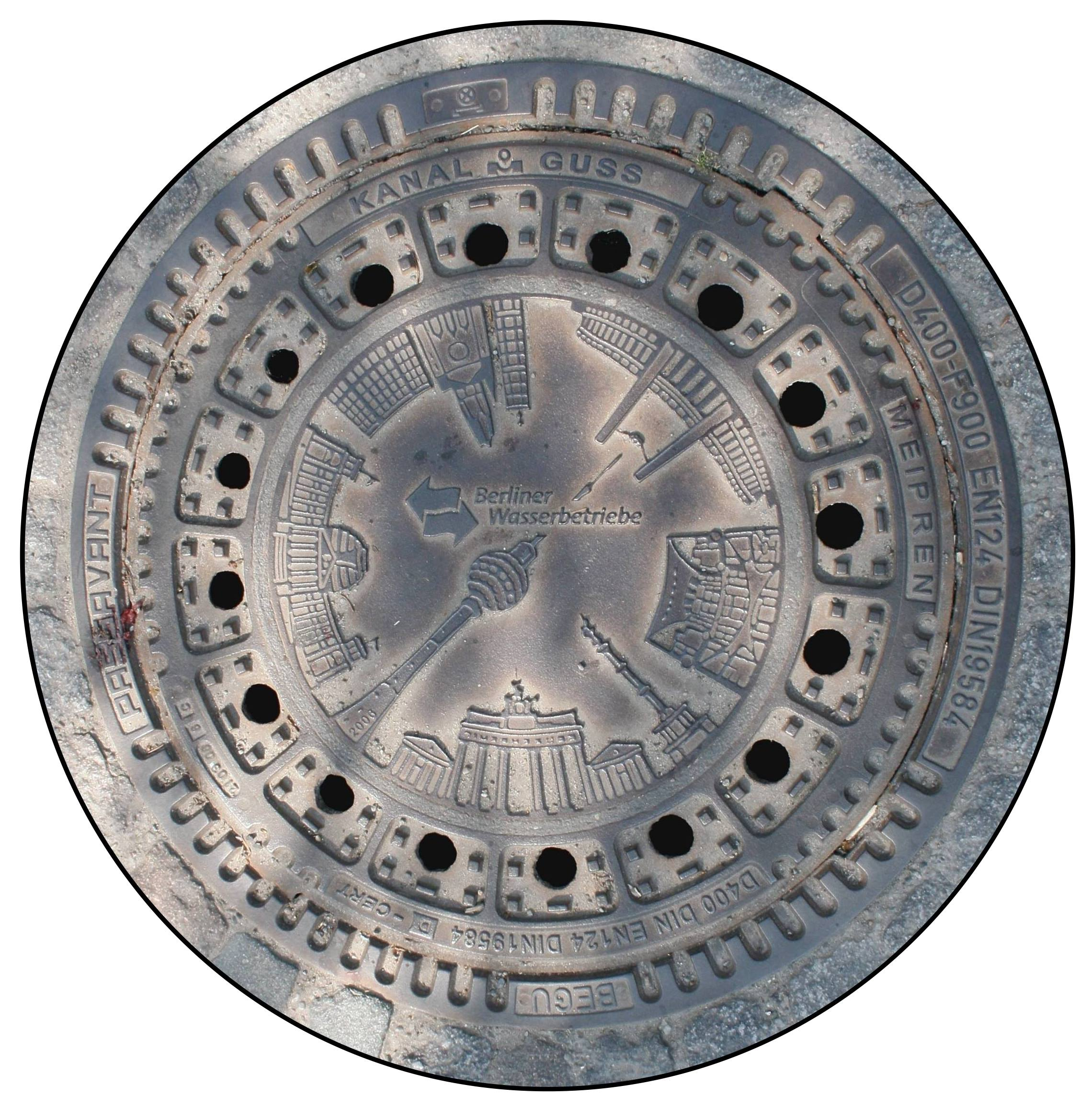 Kanaldeckel der Berliner Wasserbetriebe mit Motiven aus Berlin (Brandenburger Tor, Siegessäule, Bundeskanzleramt, Marathontor des Olympiastadions, Kaiser-Wilhelm-Gedächtniskirche, Reichstagsgebäude, Fernsehturm [unten beginnend entgegen dem Uhrzeigersinn])